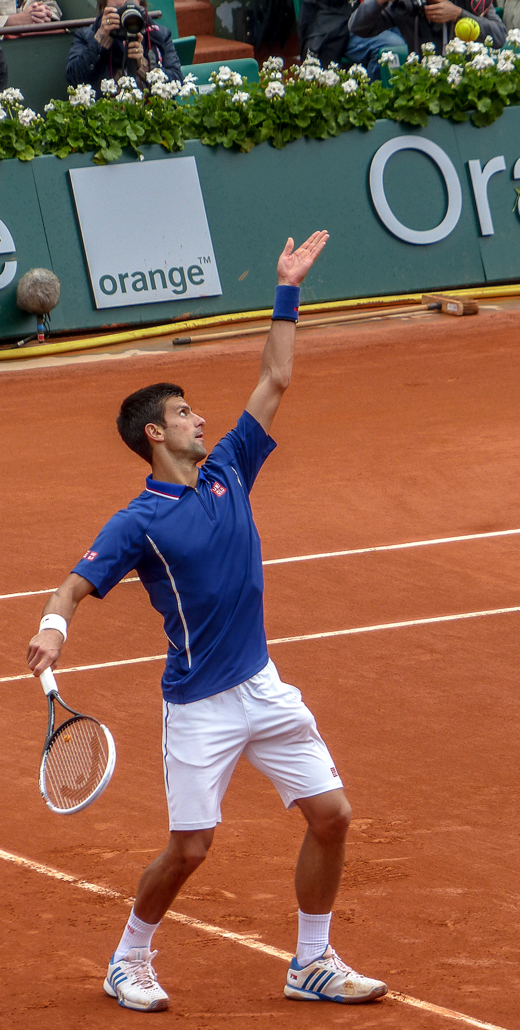 2ème tour Roland Garros 2013 : Novak Djokovic (SRB) def. Guido Pella (ARG)